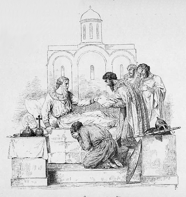 Великий Князь Владимир Мономах. 1112-1125 г. Всеобщею любовью призванный, по смерти Святополка, на княжение, славный победами и благими нравами, Владимир Мономах водворил на Руси мир. В Поучении детям этот Страдалец (труженник) за русскую землю выразил высокие чувства и мудрость правителя. Император Византийский Алексей Комнен прислал Мономаху драгоценный венец и бармы (оплечье), которыми Русские цари украшаются в день венчания на царство.